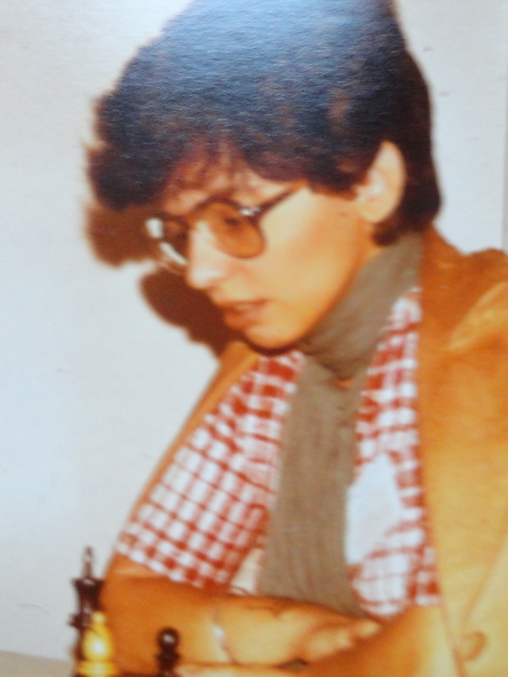 Borislava Borisova, Interzonenturnier der Frauen 1979 in Rio de Janeiro.